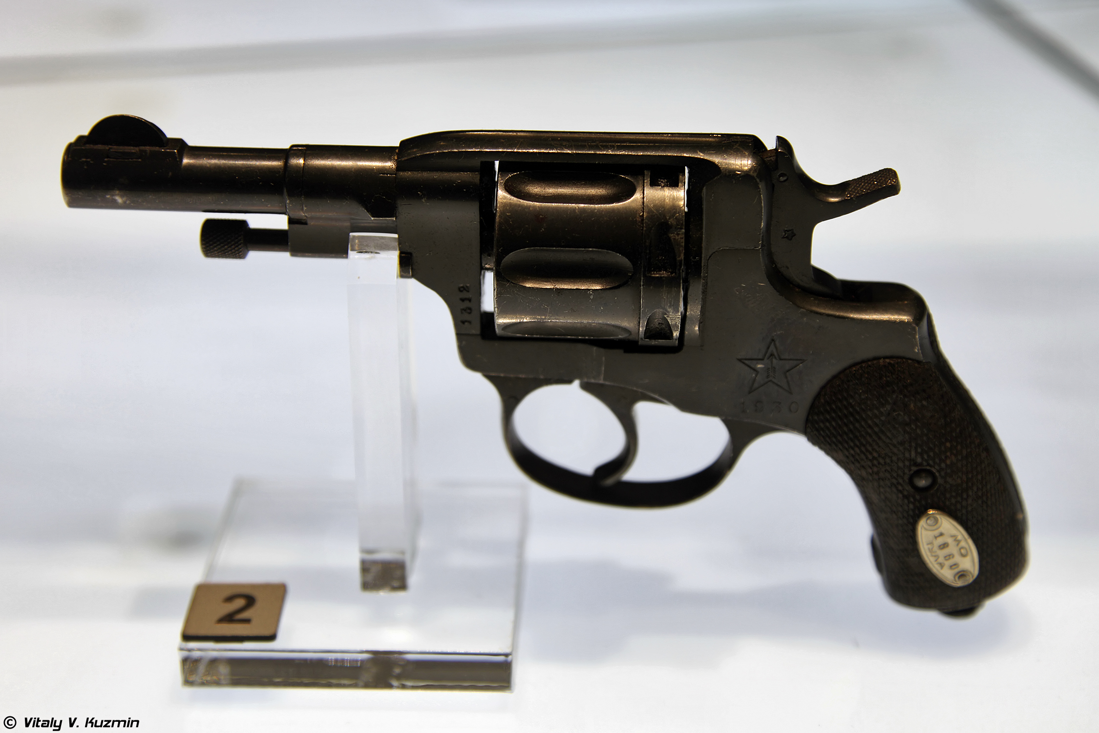 Револьвер Нагана обр. 1895 укороченный